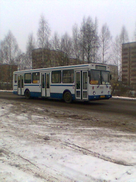 Автобус ЛиАЗ-5256 14 маршрута напротив больничного комплекса в г. Тихвине.